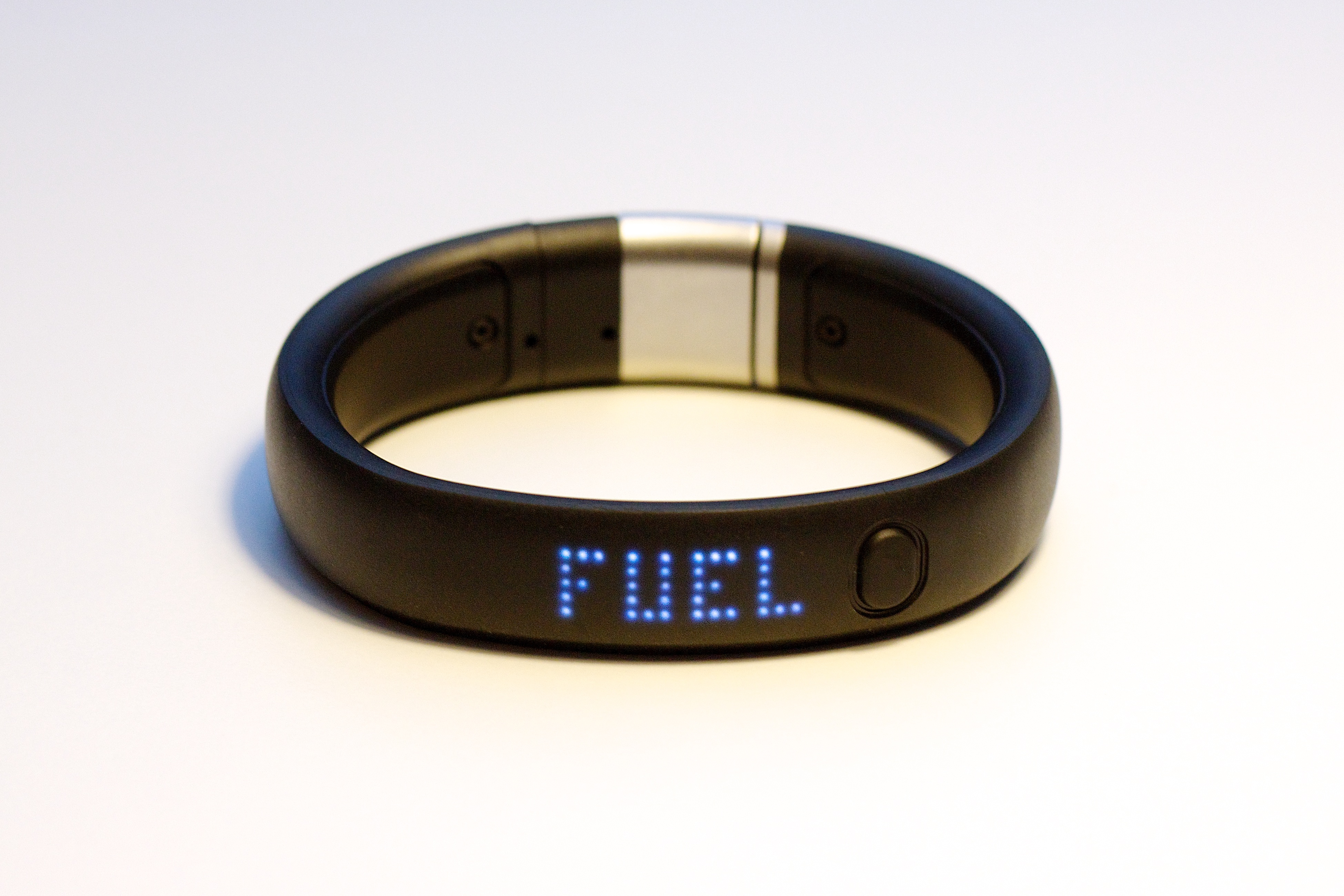 Black Steel Nike FuelBand